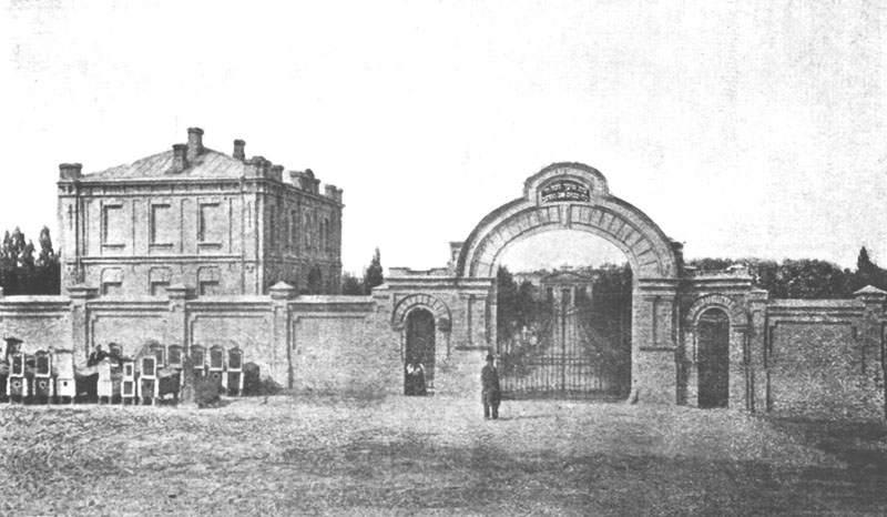 Лукьяновское еврейское кладбище: ворота и контора. Начало ХХ в.